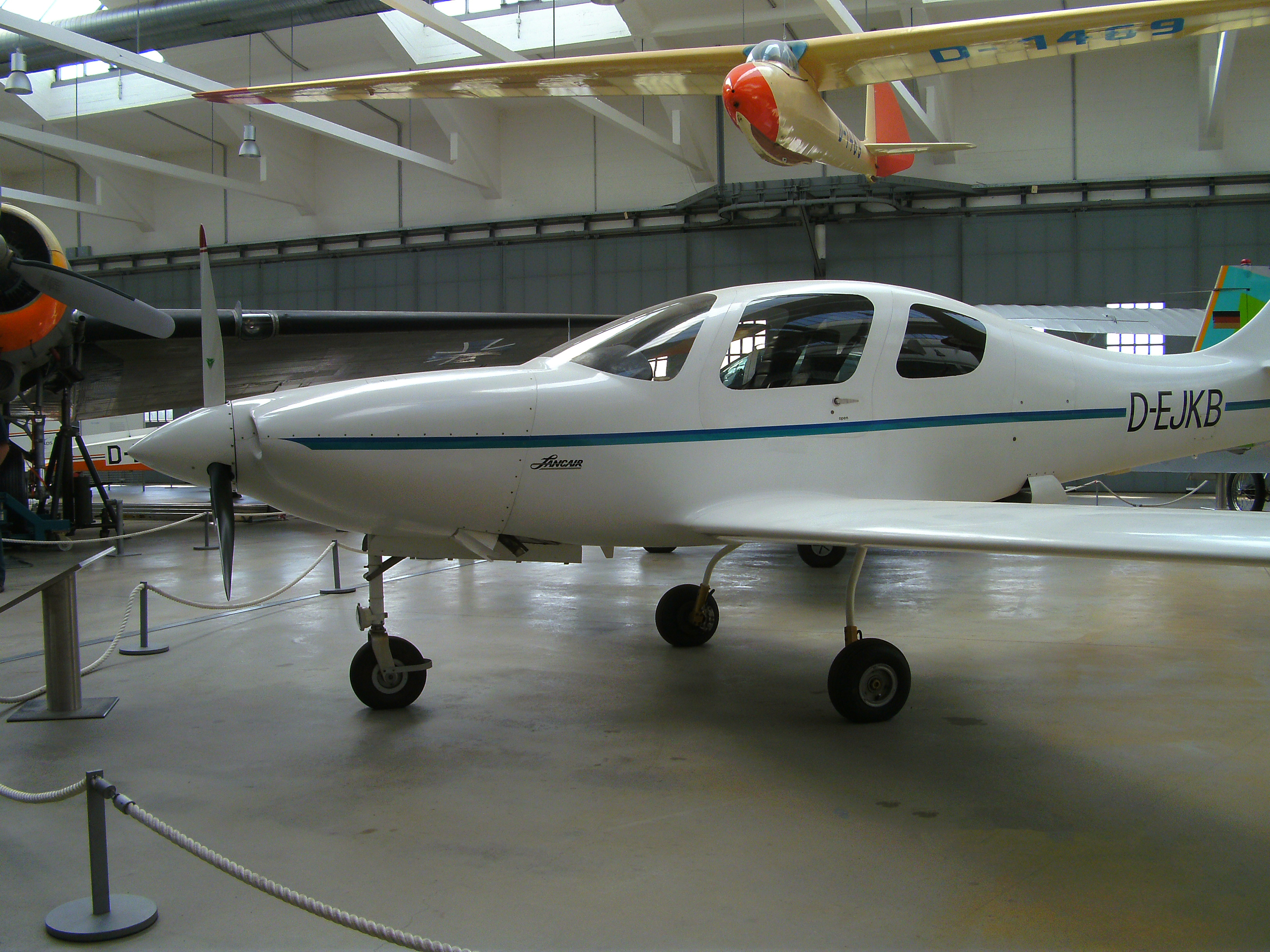 Lancair IV (D-EJKB) in der Flugwerft Schleißheim.